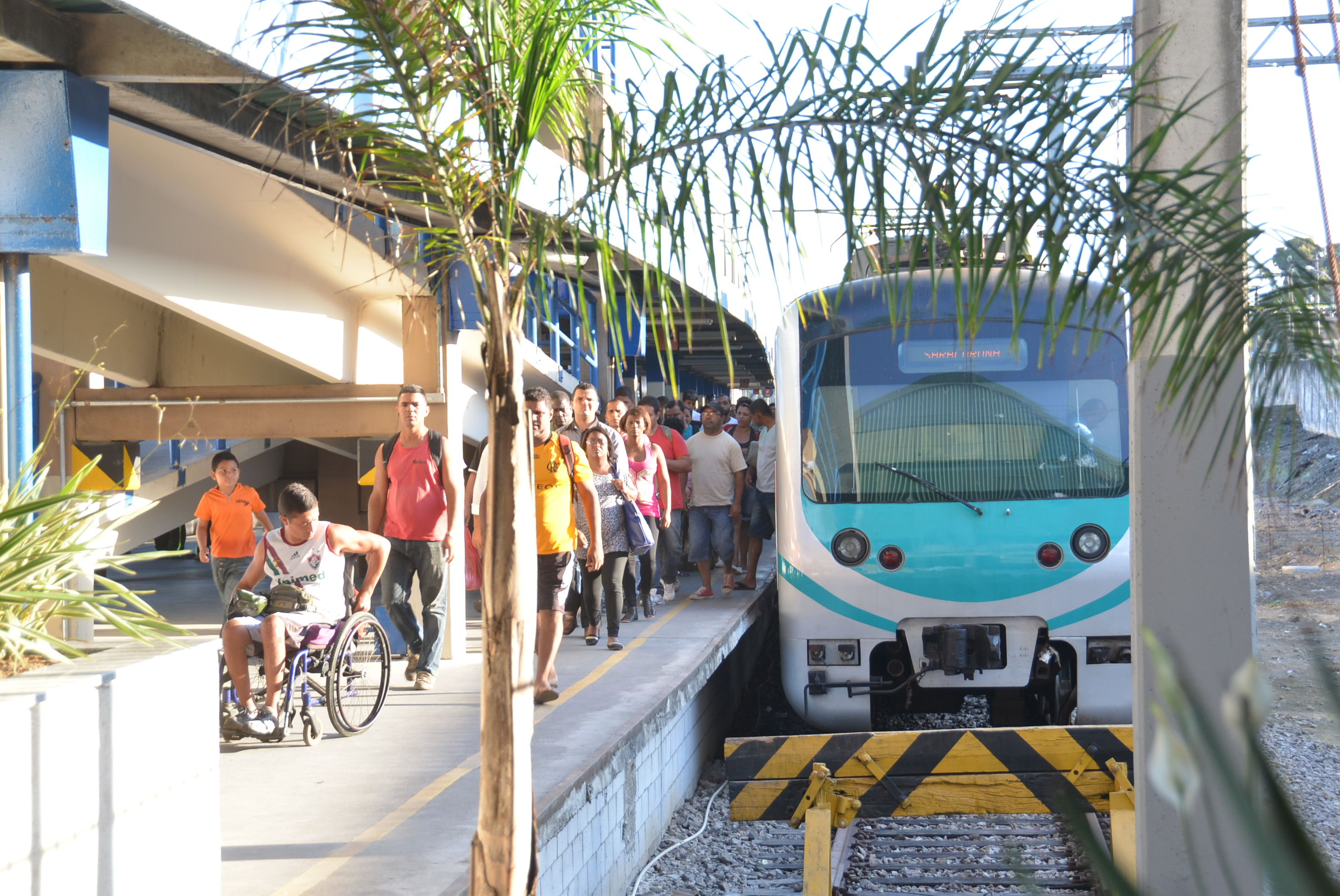 Estação Saracuruna no dia 08 de junho de 2015.